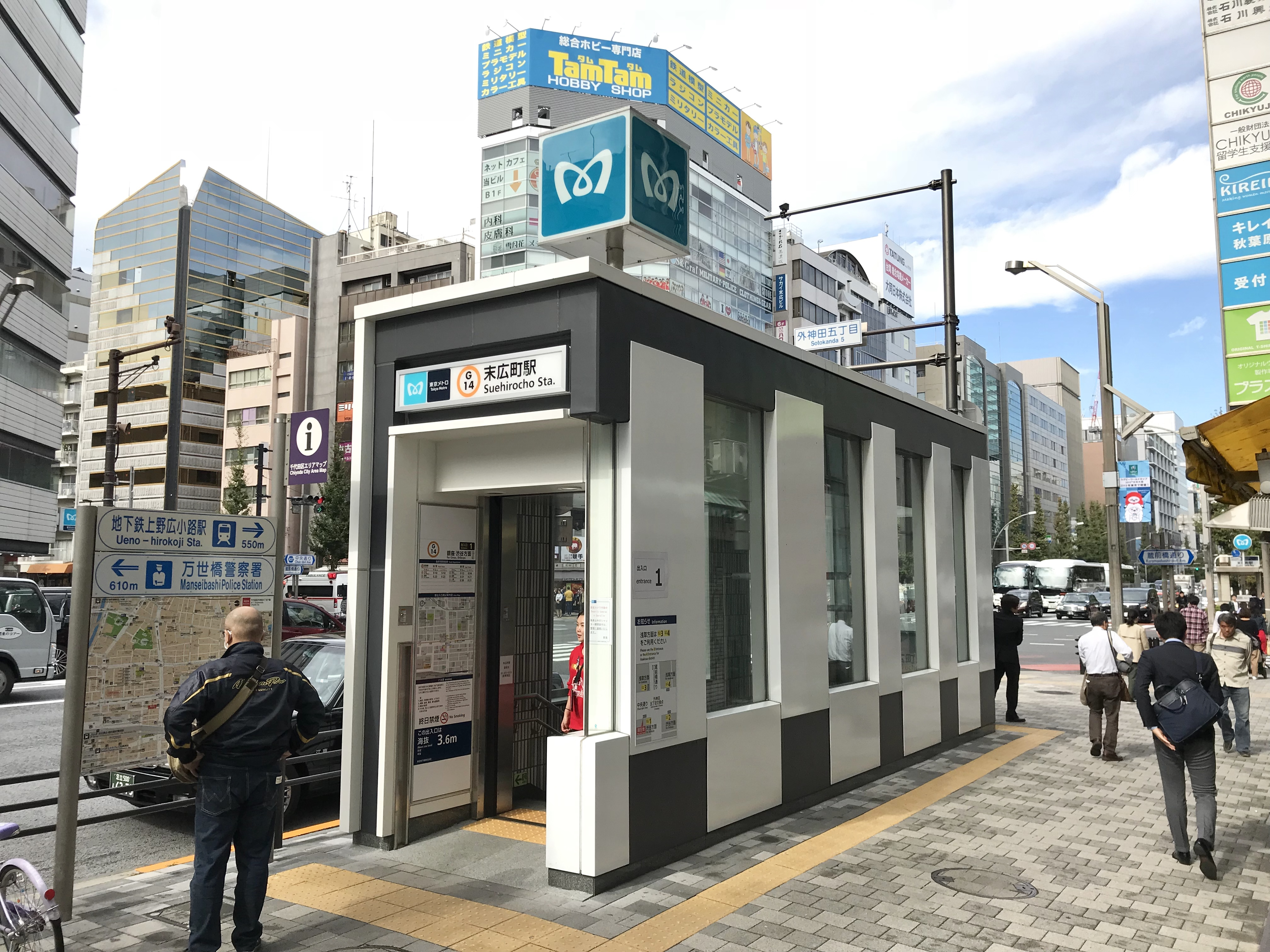 東京メトロ銀座線末広町駅1番出入口（リニューアル後）